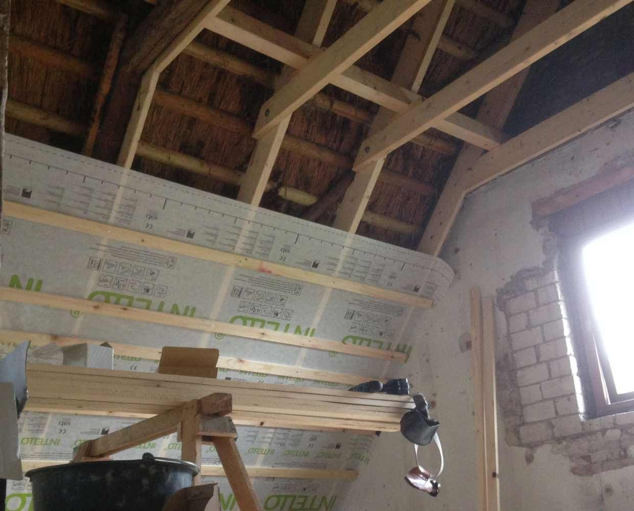 Dachausbau bei einem Reetdach, ohne Luftschicht, aber mit einer feuchtevariablen Dampfbremsfolie. Das Dach wird mit der Dampfbremsfolie für die Verfüllung mit Zellulose-Einblasdämmung vorbereitet. Durch den Verzicht auf eine Luftschicht entsteht ein größerer Innenraum. Die Aufgabe der Luftschicht als Trocknungsmedium wird von der Zellulosedämmung übernommen, die den Feuchteeintrag durch Warmlufteinströmung unterbindet, außerdem Kondensat absaugt und umverteilt.